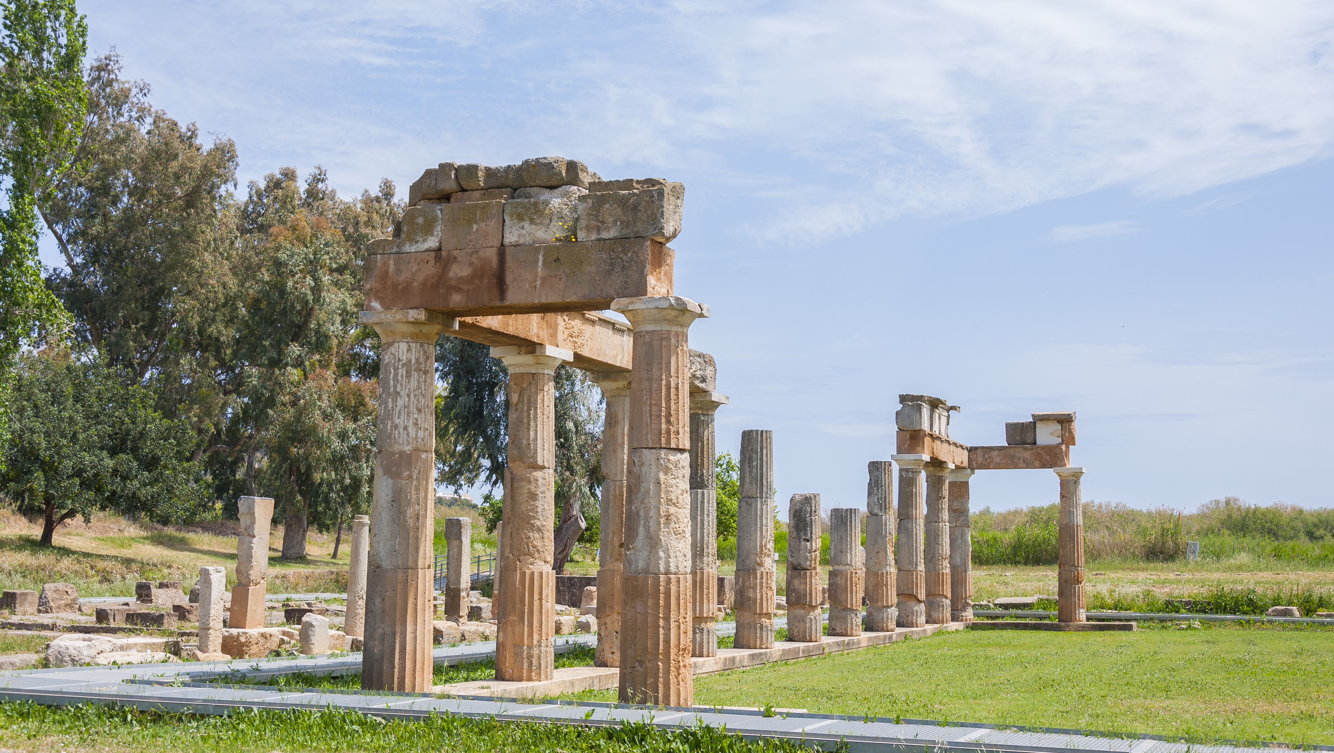 Βραυρώνα«Βραυρώνα»